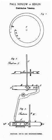 Gràfic del disc de Nipkow de l'aplicació original de la patent